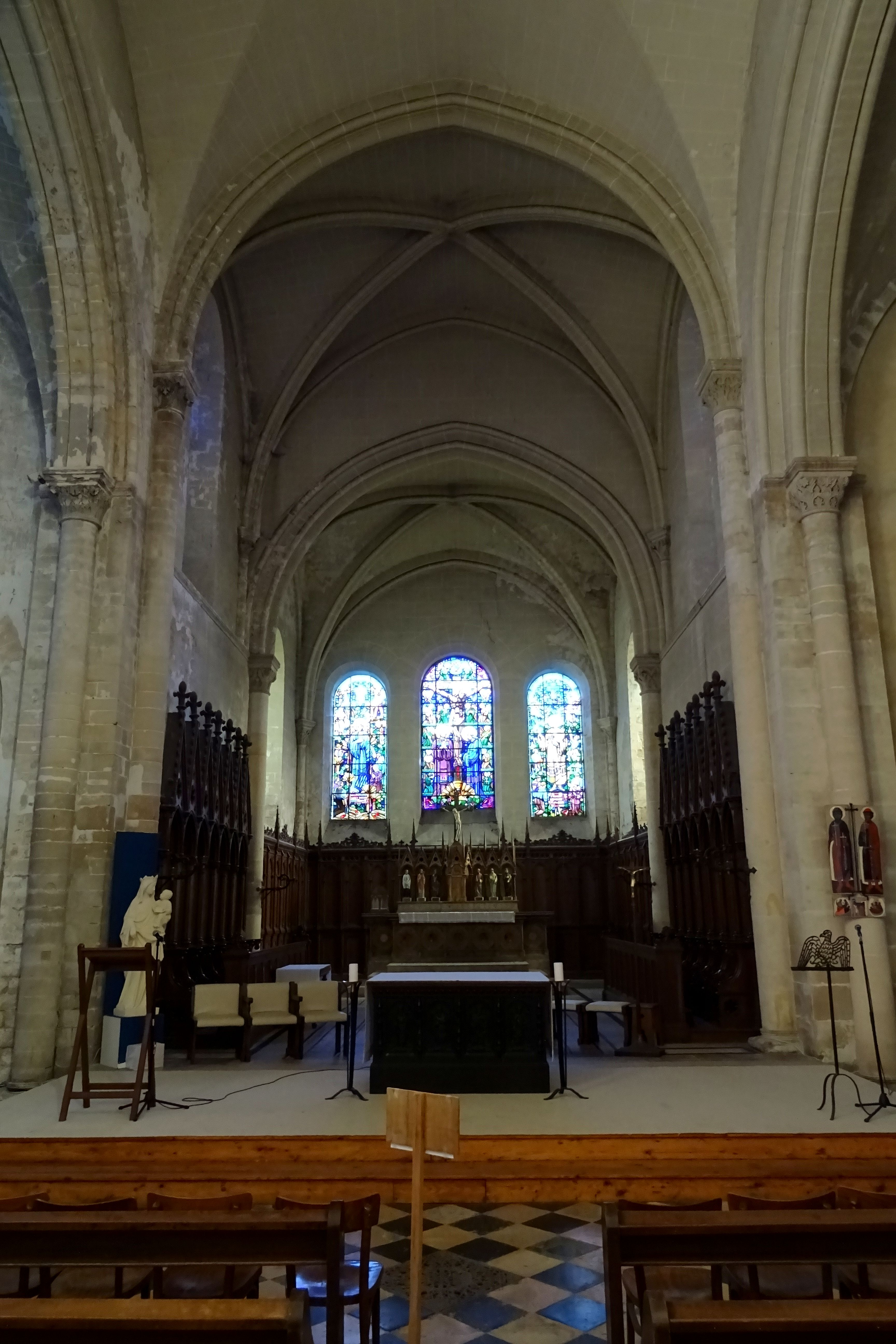 Voir titre.